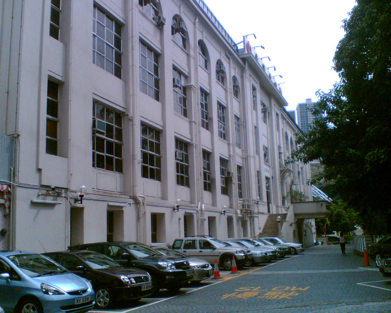 中文（香港）: 東華東院。